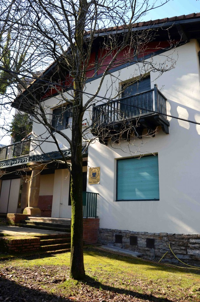 Donostiako Antigua auzoan dagoen gaztetxea